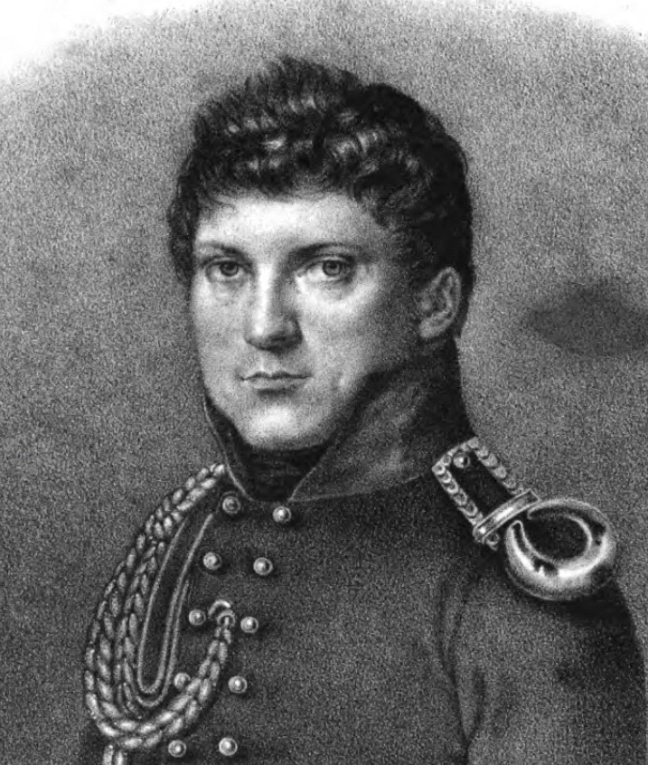 Maximilian Karl Friedrich Wilhelm Grävell (1781–1860)